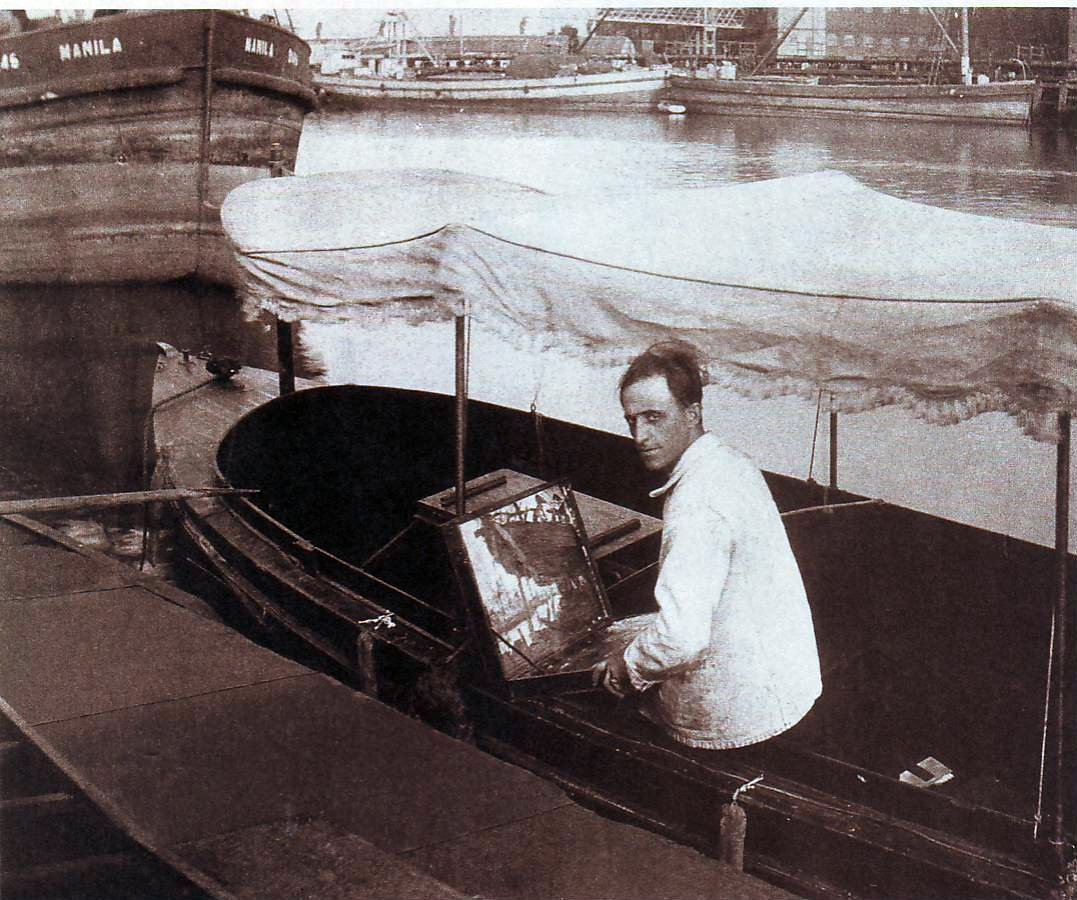 Benito Quinquela Martín pintando un cuadro en el barrio porteño de La Boca.